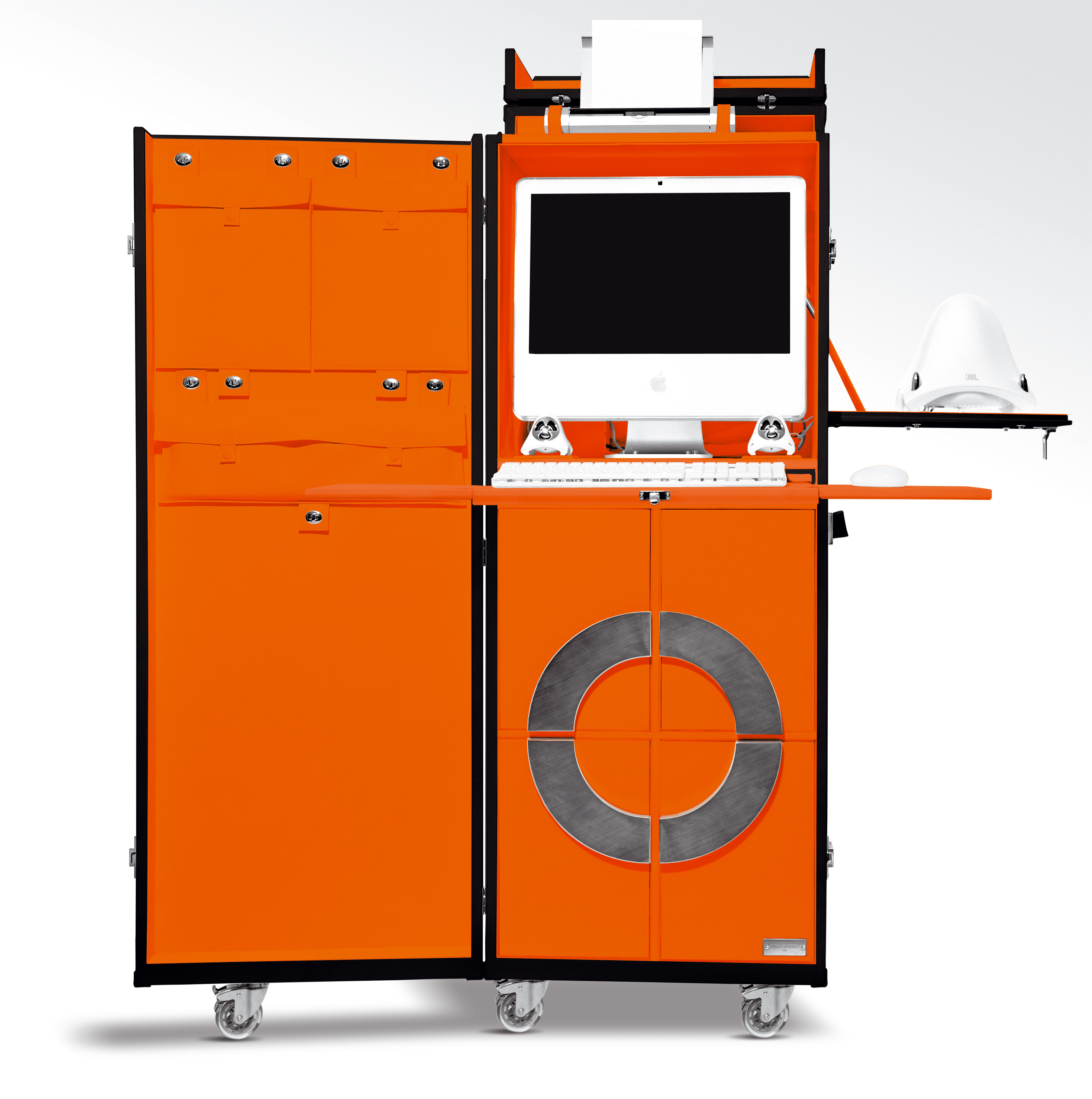 Malle i-Trunk créée par la maison de luxe Pinel & Pinel